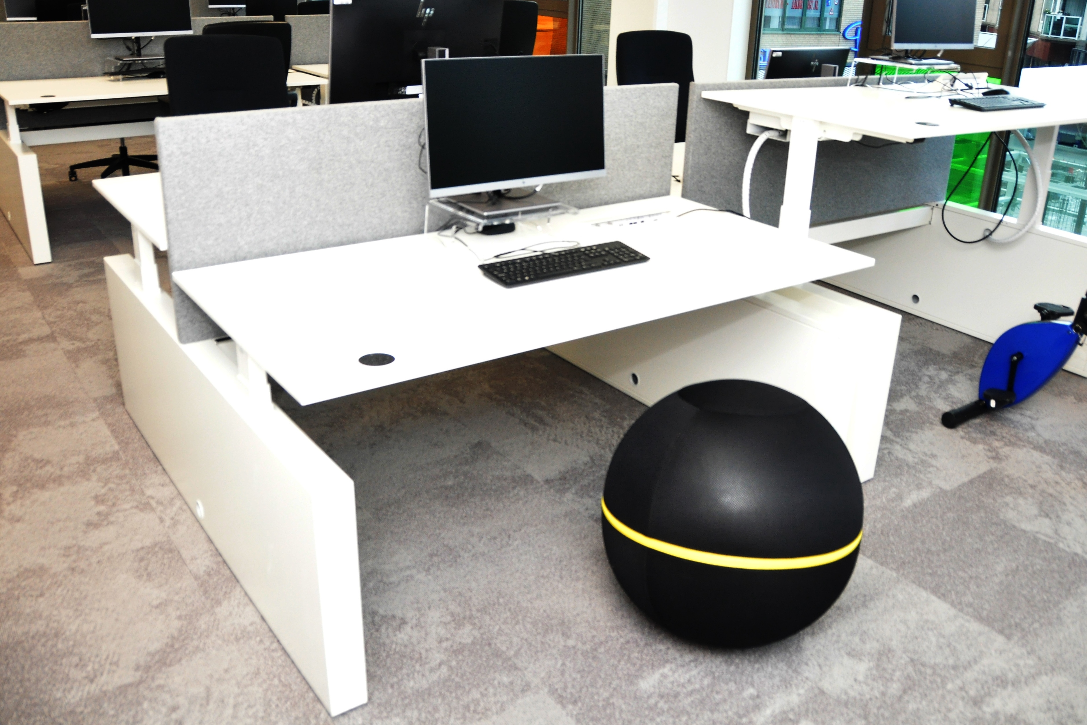 Open dag van het verbouwde stadhuis Zoetermeer.